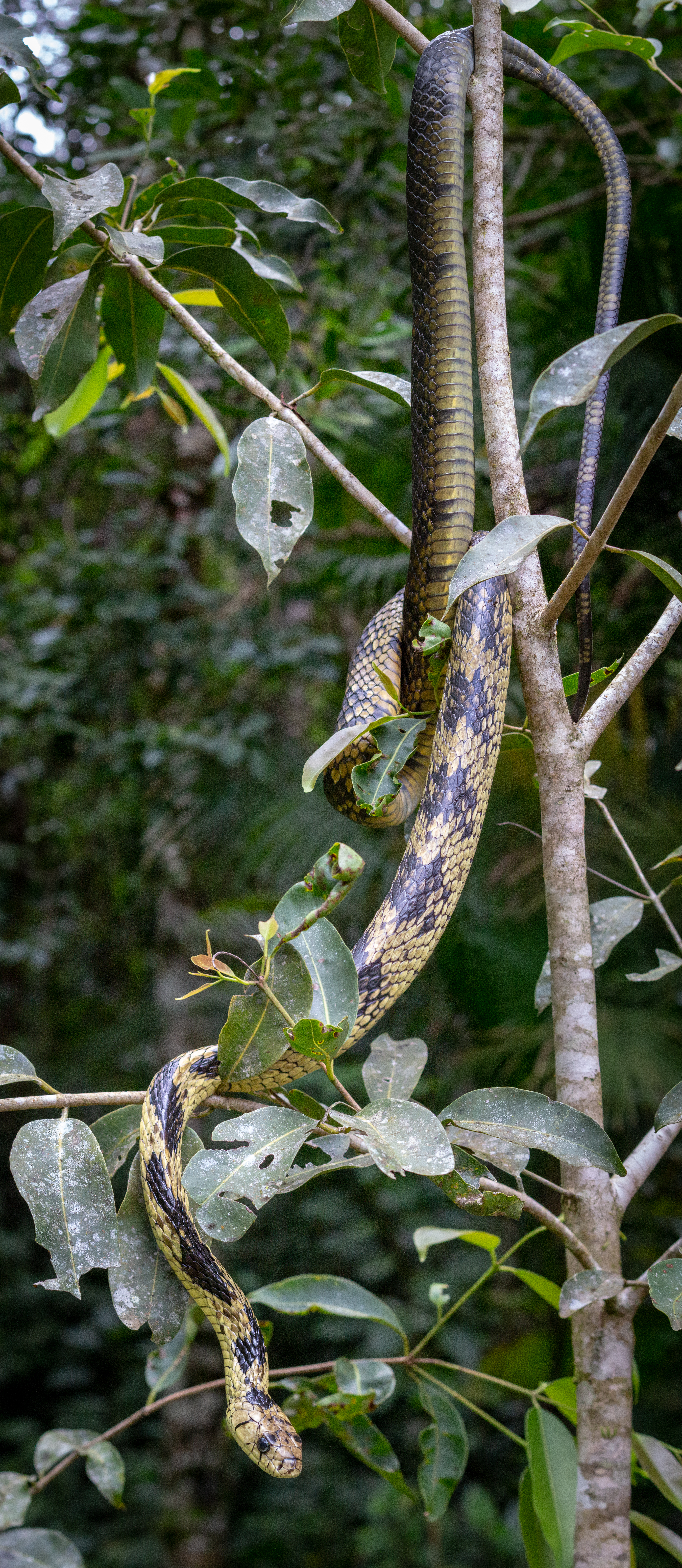 Spilotes pullatus por Luan Alves Chaves- Expedição PETAR 2020